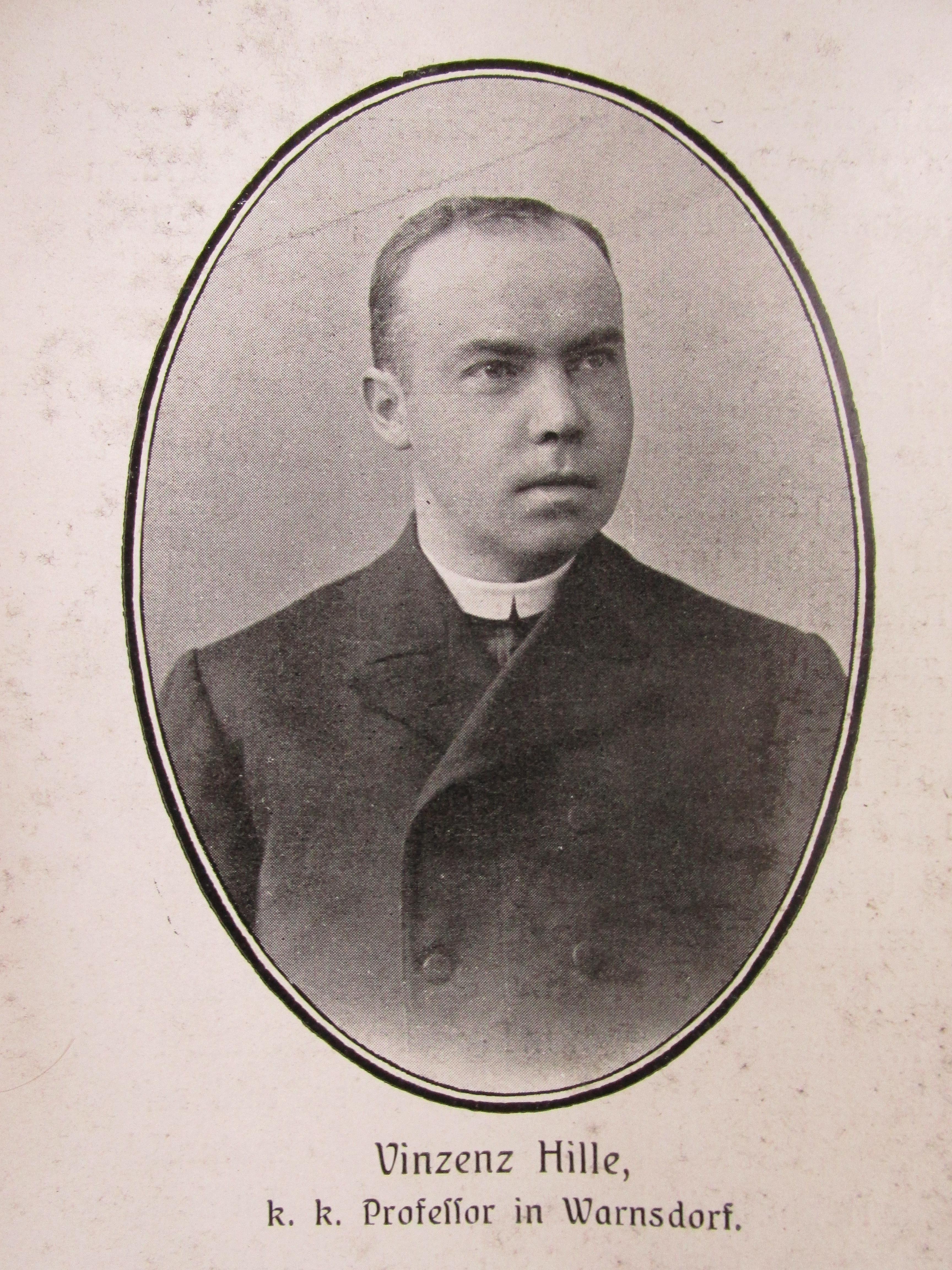 P. Winzenz Hille; * 06. 11. 1872 Nové Křečany u Rumburku, čp. 147; syn: Wnzenz Hille - tkadlec, syn Johana Hille a Brigitty, dcery Antona Künssta; Franziska, dcera Aloise Eiserta - tkadlece a Franzisky, dcery Josefa Häntsche; gymnaziální studia na Gymnáziu v Liberci; filosoficko - teologická studia v Litoměřicích;ord. na kněze 11. 07. 1897; kaplan v České Kamenici; katecheta měšťanské školy v Novém Boru (od 01. 09. 1904; katecheta měšťanské školy v Ústí nad Labem (od 01. 04. 1905); katechata na státní reálné škole ve Varnsdorfu (od 01. 09. 1907); prezident "Katholischen Univ. - Vereines für Böhmen"; + 13. 08. 1931 ve Vansdorfu